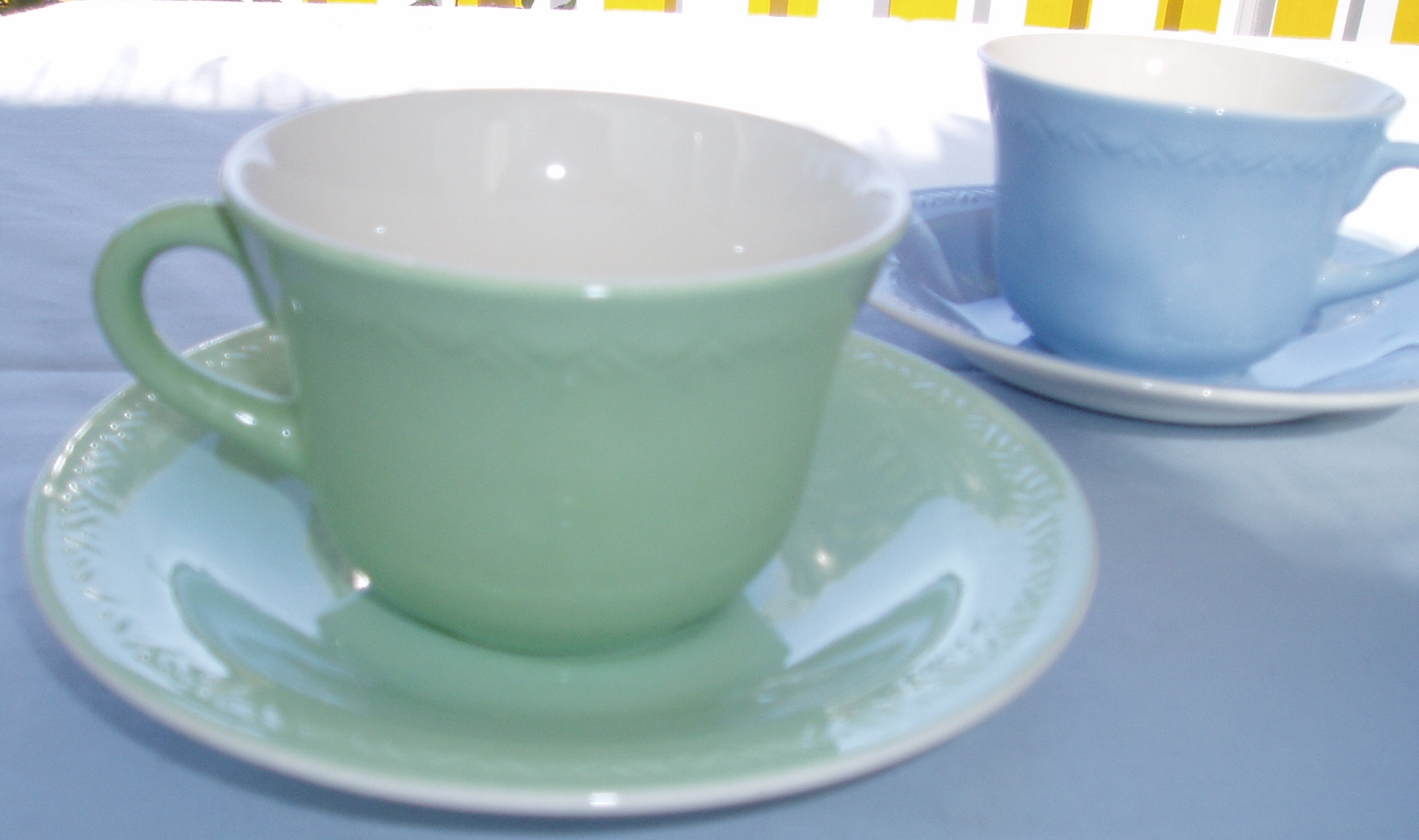 To koppar med underskål, frå serviset Grete, designa av Ragnar Grimsrud, produsert av Figgjo Flint i Sandnes, Noreg. Dei er laga i flintgods. Dette er den grøne og den blå versjonen, serviset vart også laga i ei gul og ei rosa utgåve (den rosa er meir uvanleg, og vanskeleg å finna).